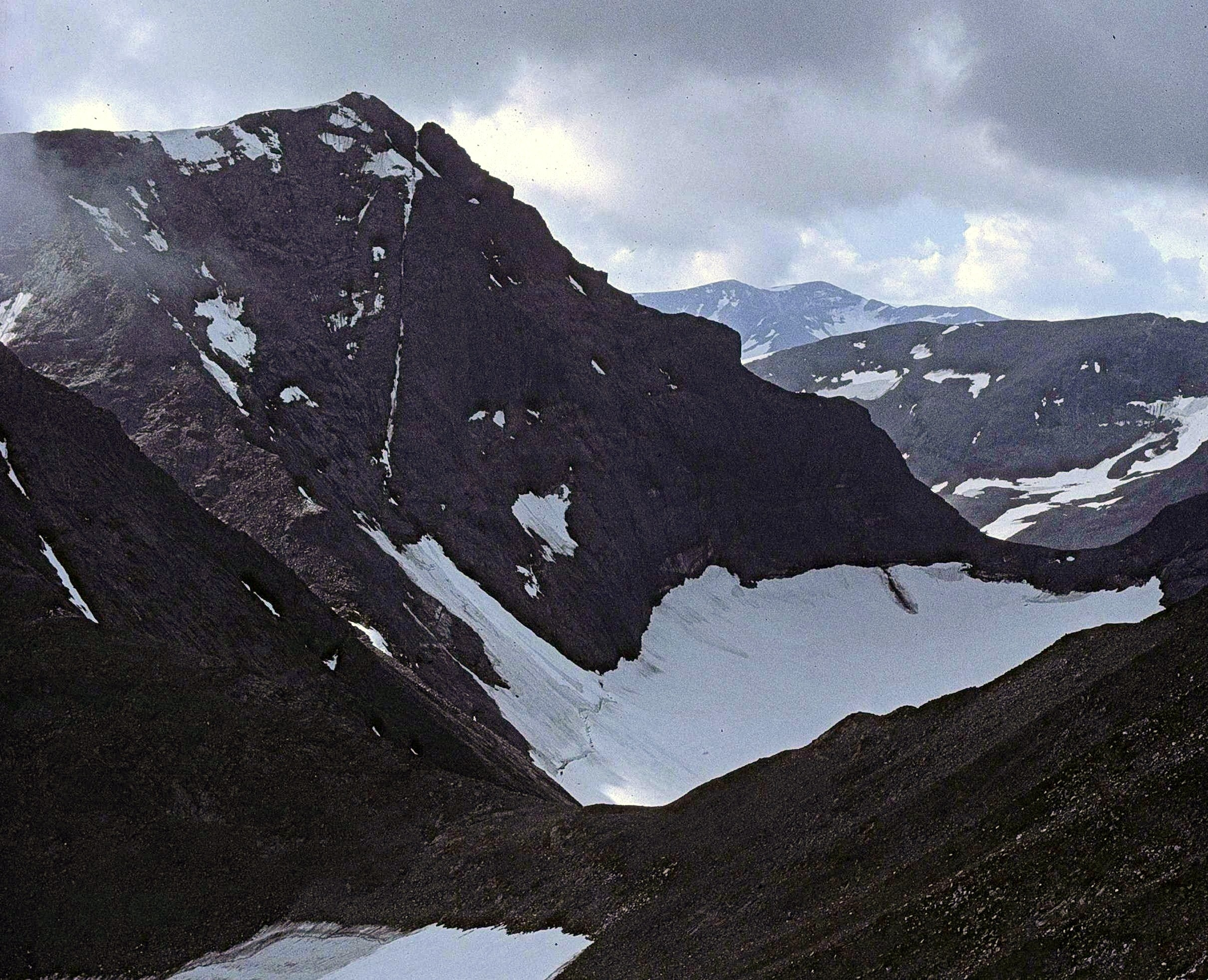 kåtokkaskatjåkko i Sareks nationalpark